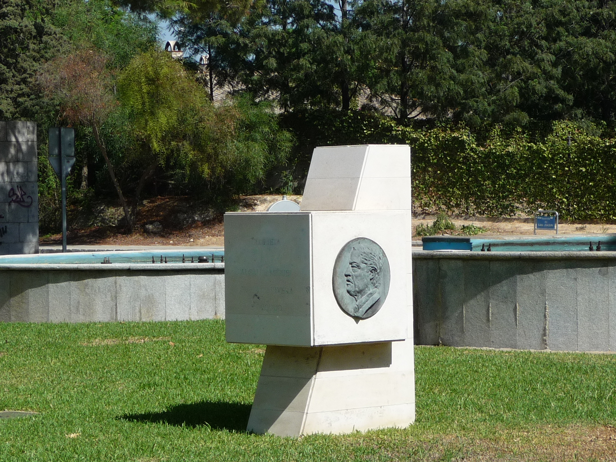 Monumento al Alcalde Miguel Primo de Rivera y Urquijo en Jerez (España), actualmente retirado